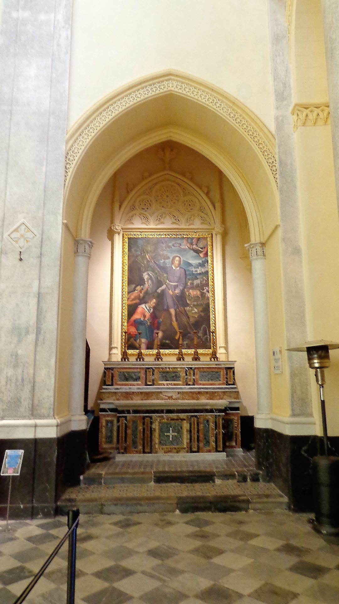 Cappella di Sant'Isidoro Agricola, tela Sant'Isidoro Agricola, opera di Orazio Ferraro da Giuliana